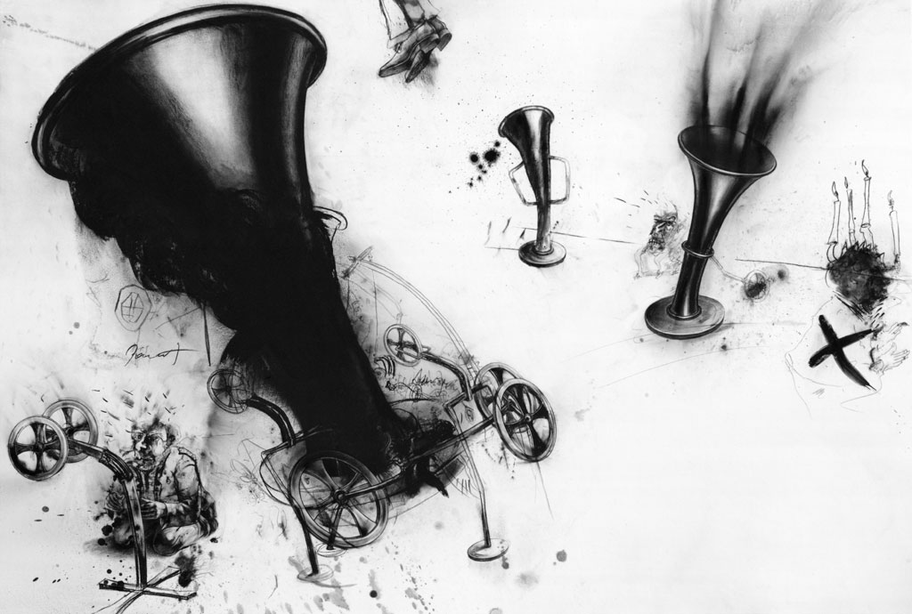 Uwe Ernst: Zur Liebe nach oben (2004)